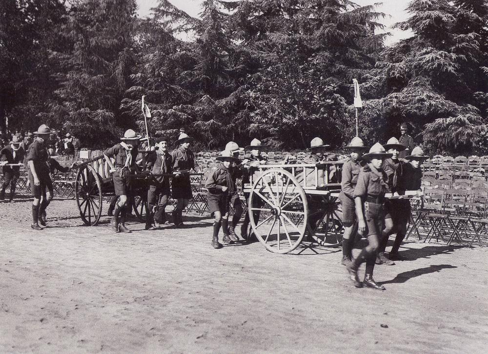 Exploradores de España madrileños en El Pardo (1926)